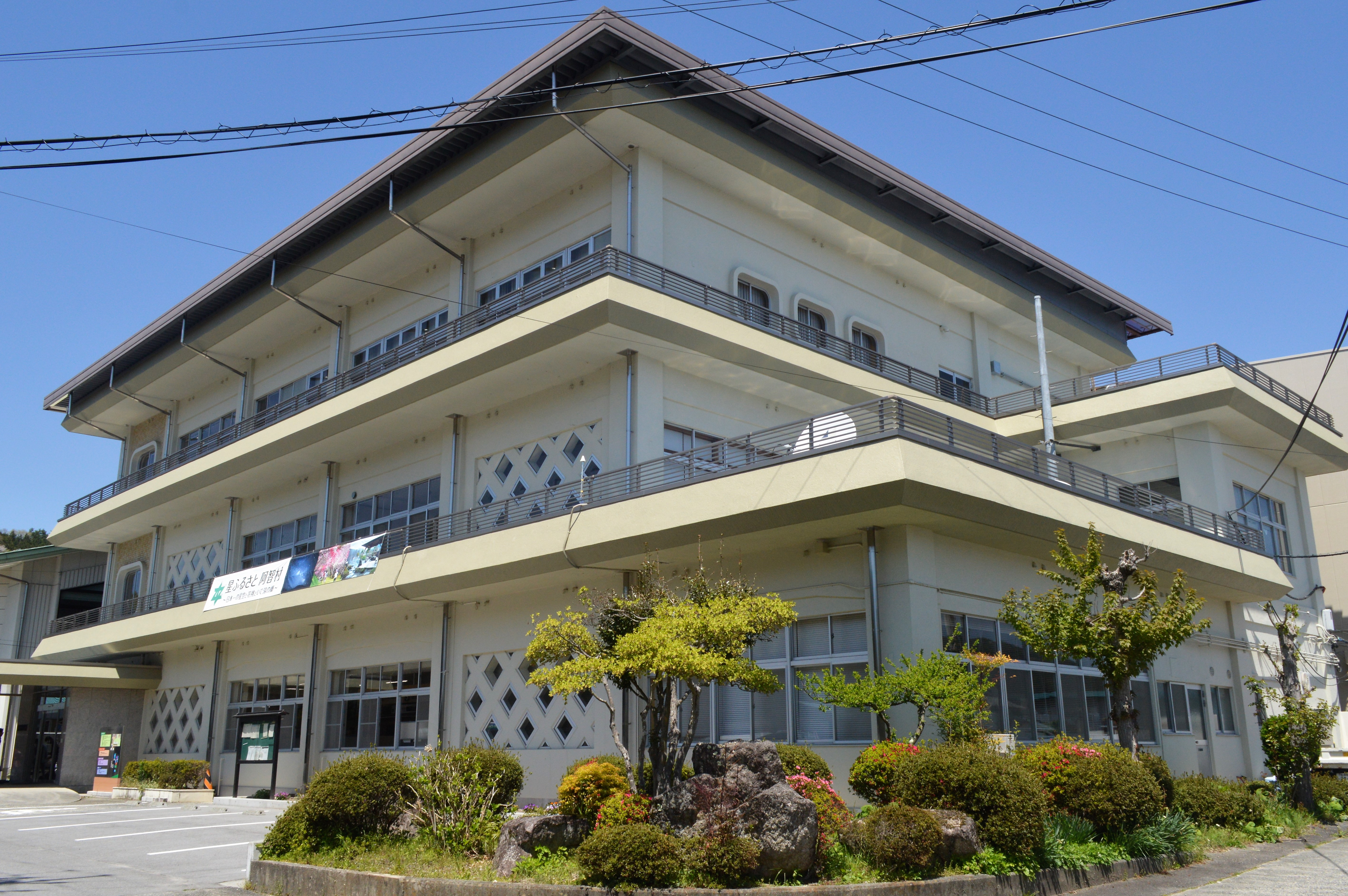 長野県下伊那郡阿智村の阿智村役場。